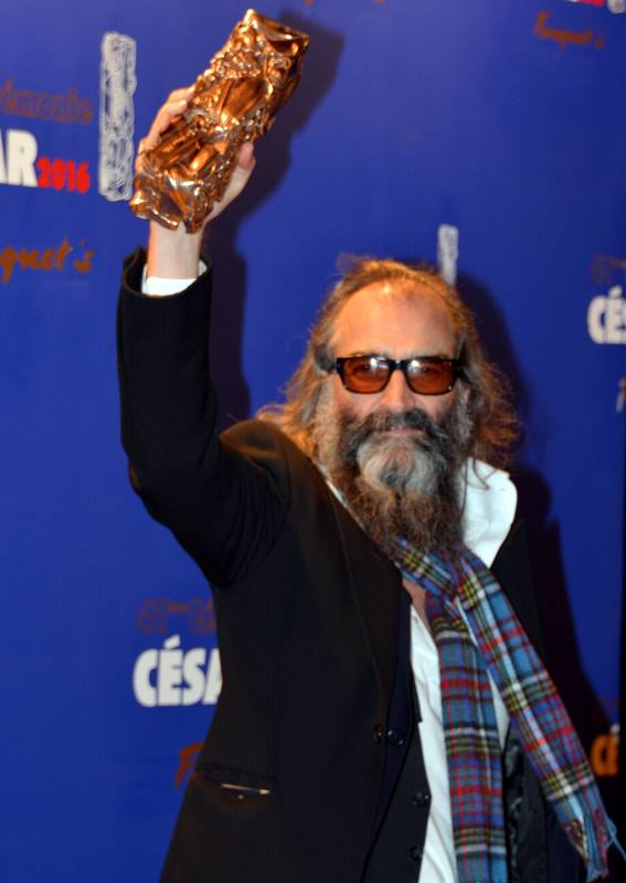 Warren Ellis à la cérémonie des César